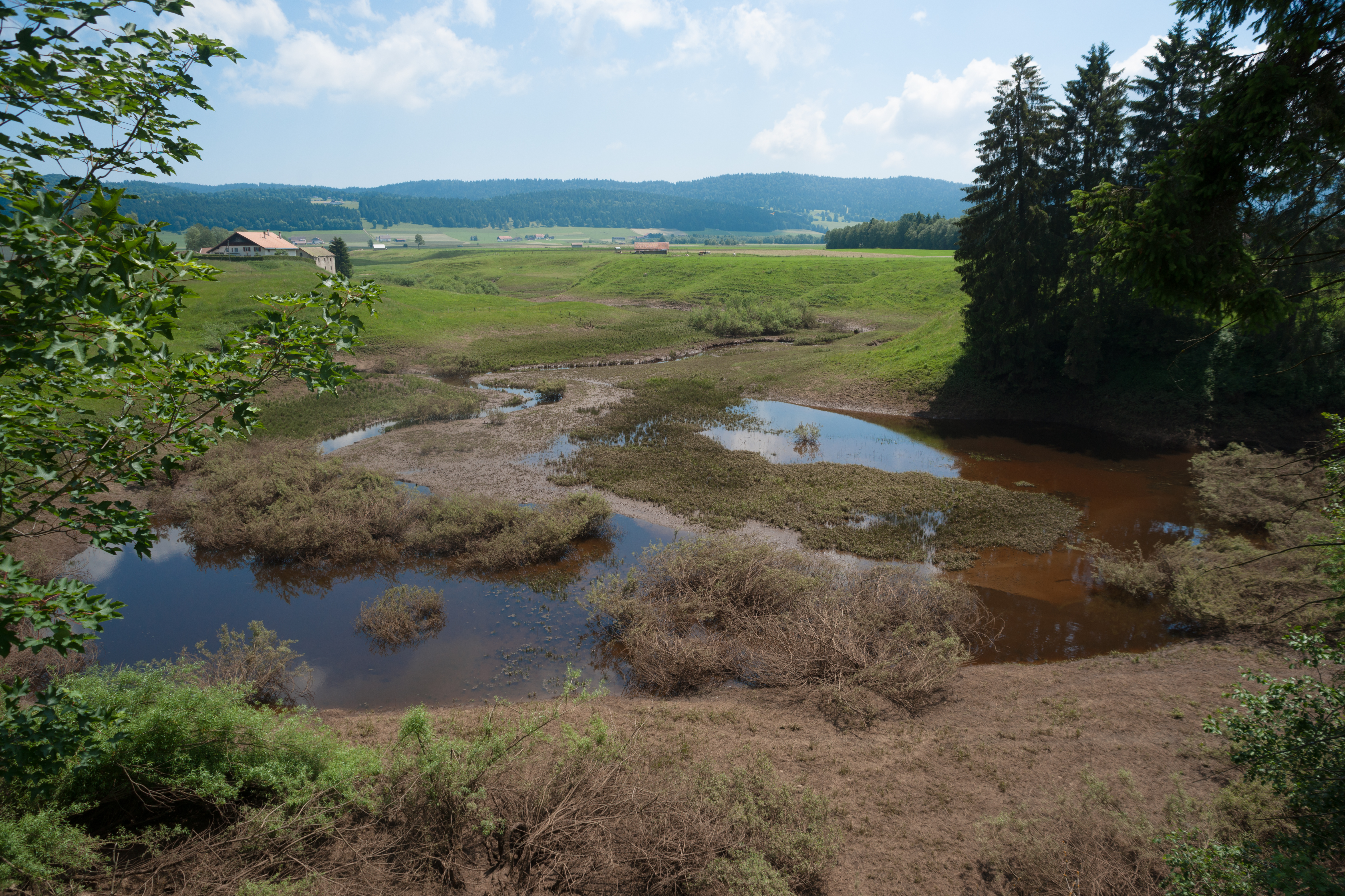 La perte du voisinage, dolinne du Bied de la Vallée des Ponts, canton de Neuchatel, Suisse.